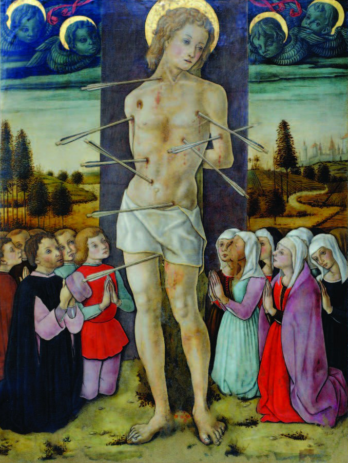 Vittore Crivelli, San Sebastiano e devoti, Montegiorgio, chiesa dei SS. Giovanni Battista e Benedetto, 105 х 79 см, темпера и позолота на дереве